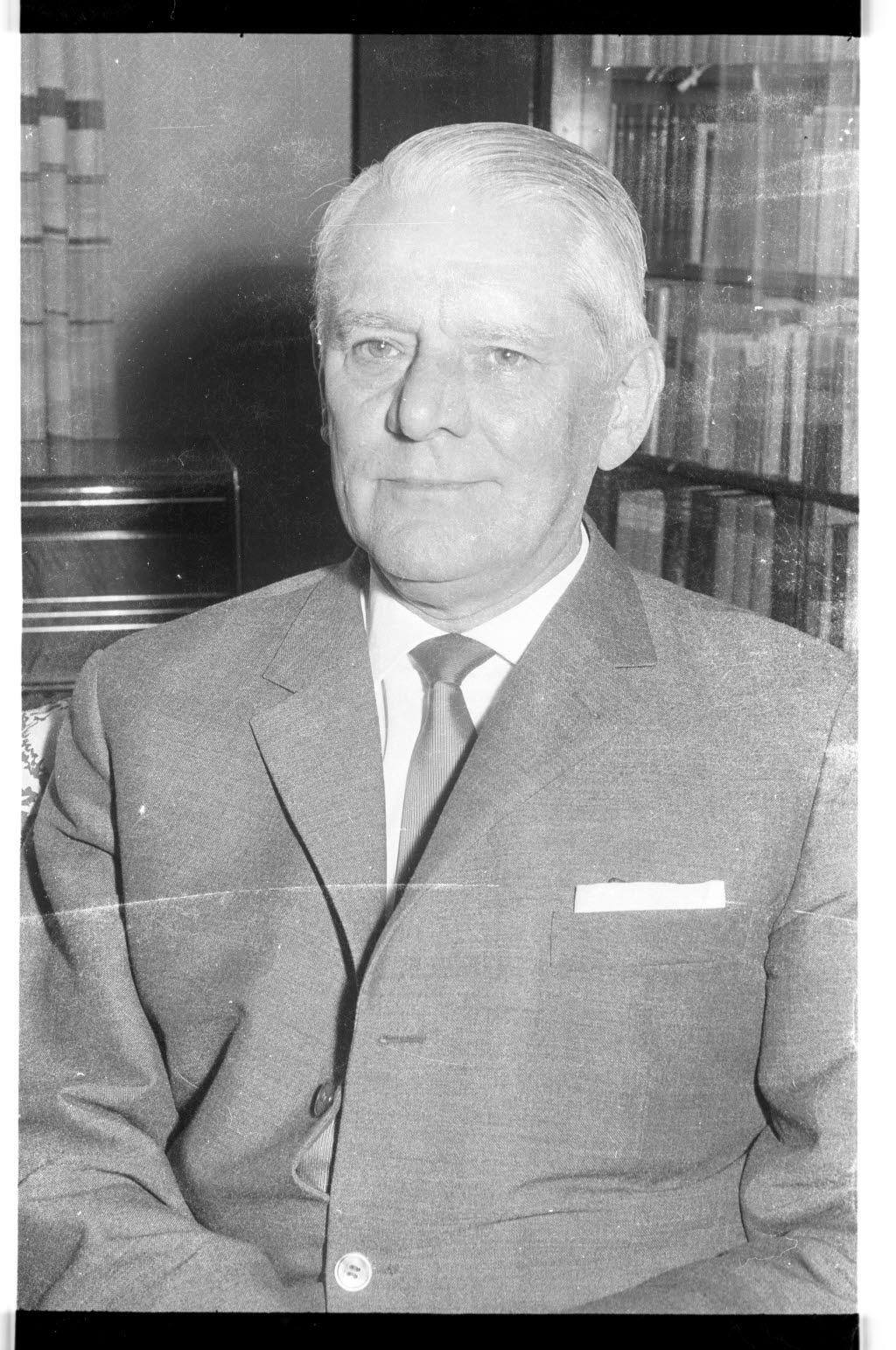 Ordinarius für Schleswig-Holsteinische und Nordische Geschichte an der Christian Albrechts Universität (CAU).